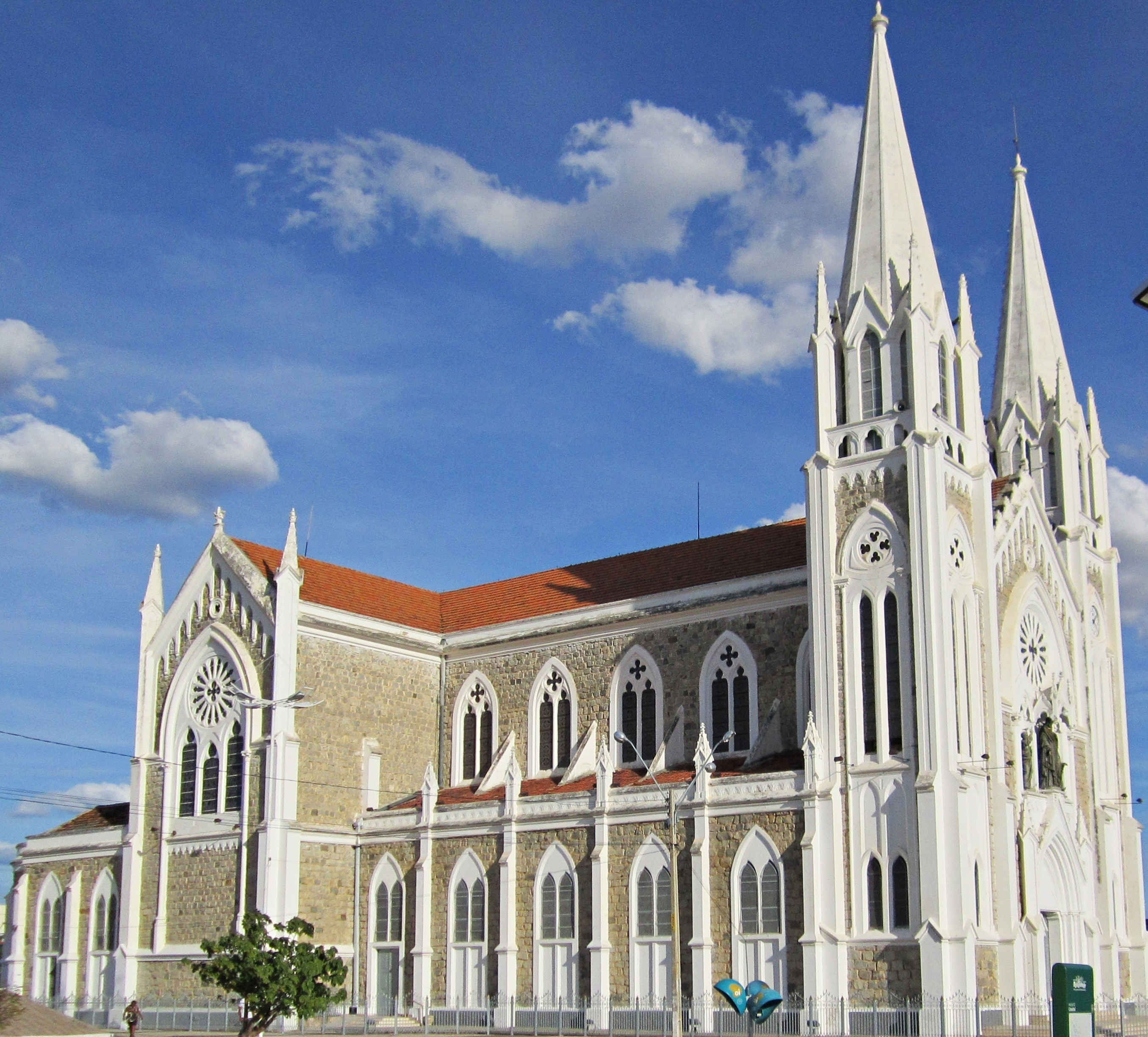 Catedral – Igreja Sagrado Coração de Jesus - Petrolina, Pernambuco, Brasil